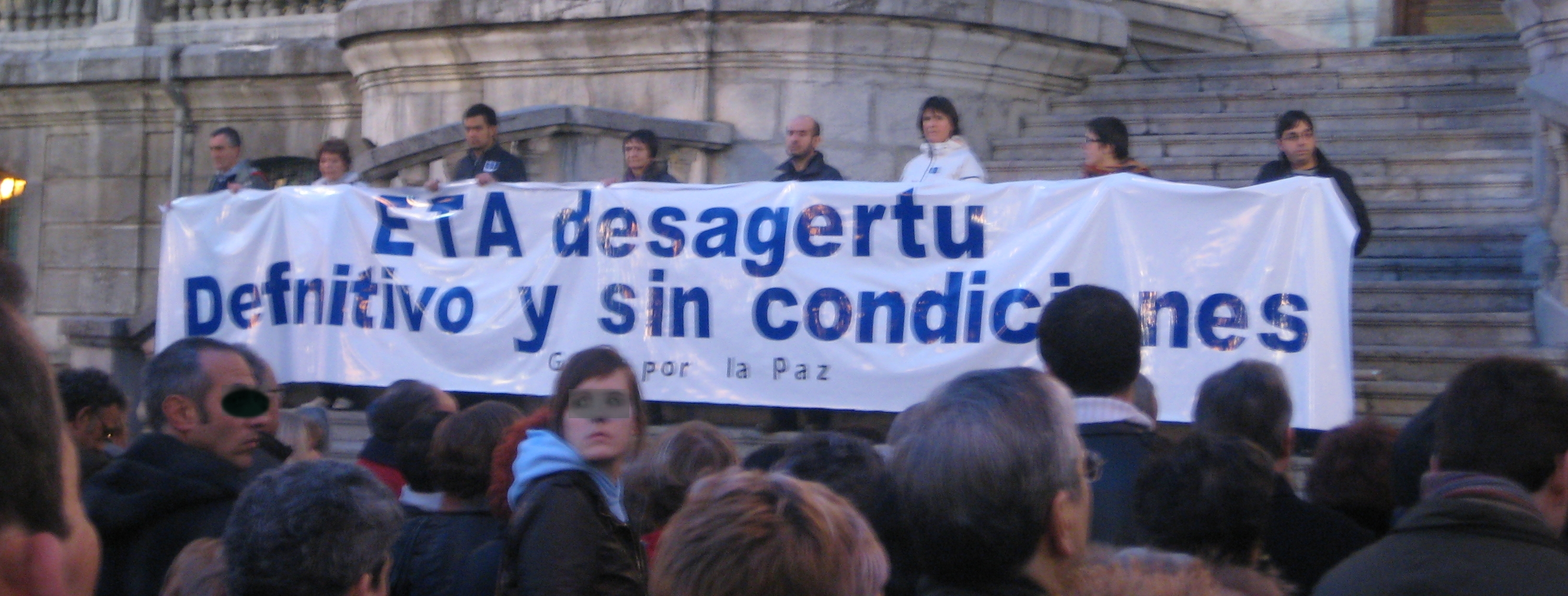 Pancarta de la Coordinadora Gesto por la Paz de Euskal Herria en las escaleras del Ayuntamiento de Bilbao tras la manifestación del 29 de enero de 2011.